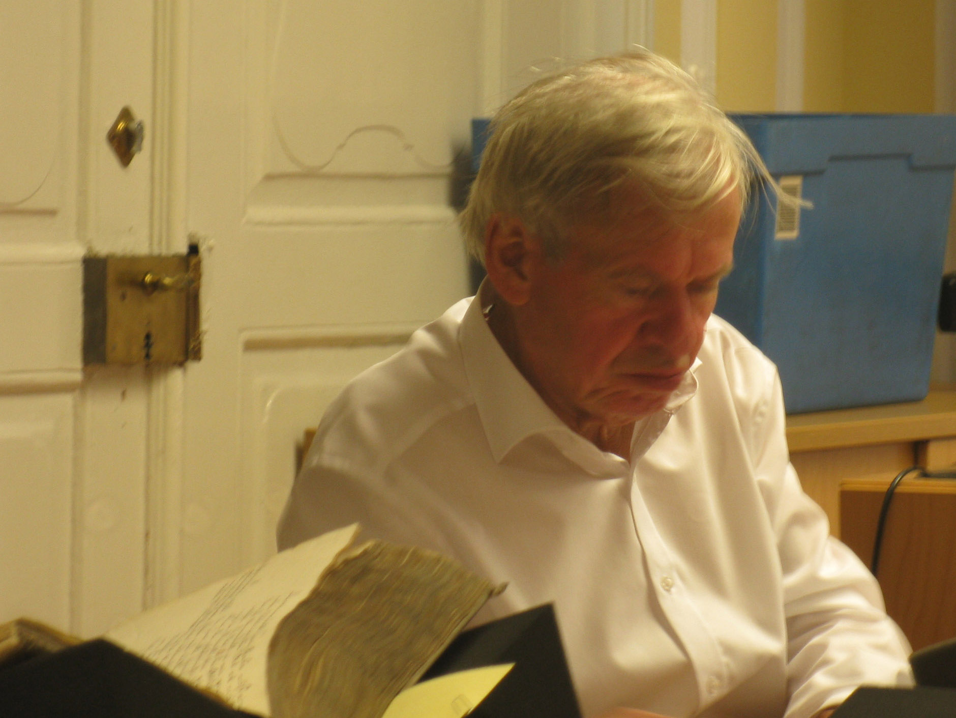 Prof. Dr. Joachim Telle, September 2012 in Gotha